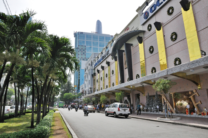 Nguyen HUe, Saigon, q1. tphcm, Dyt